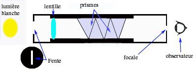 construction du spectroscopeà prismes